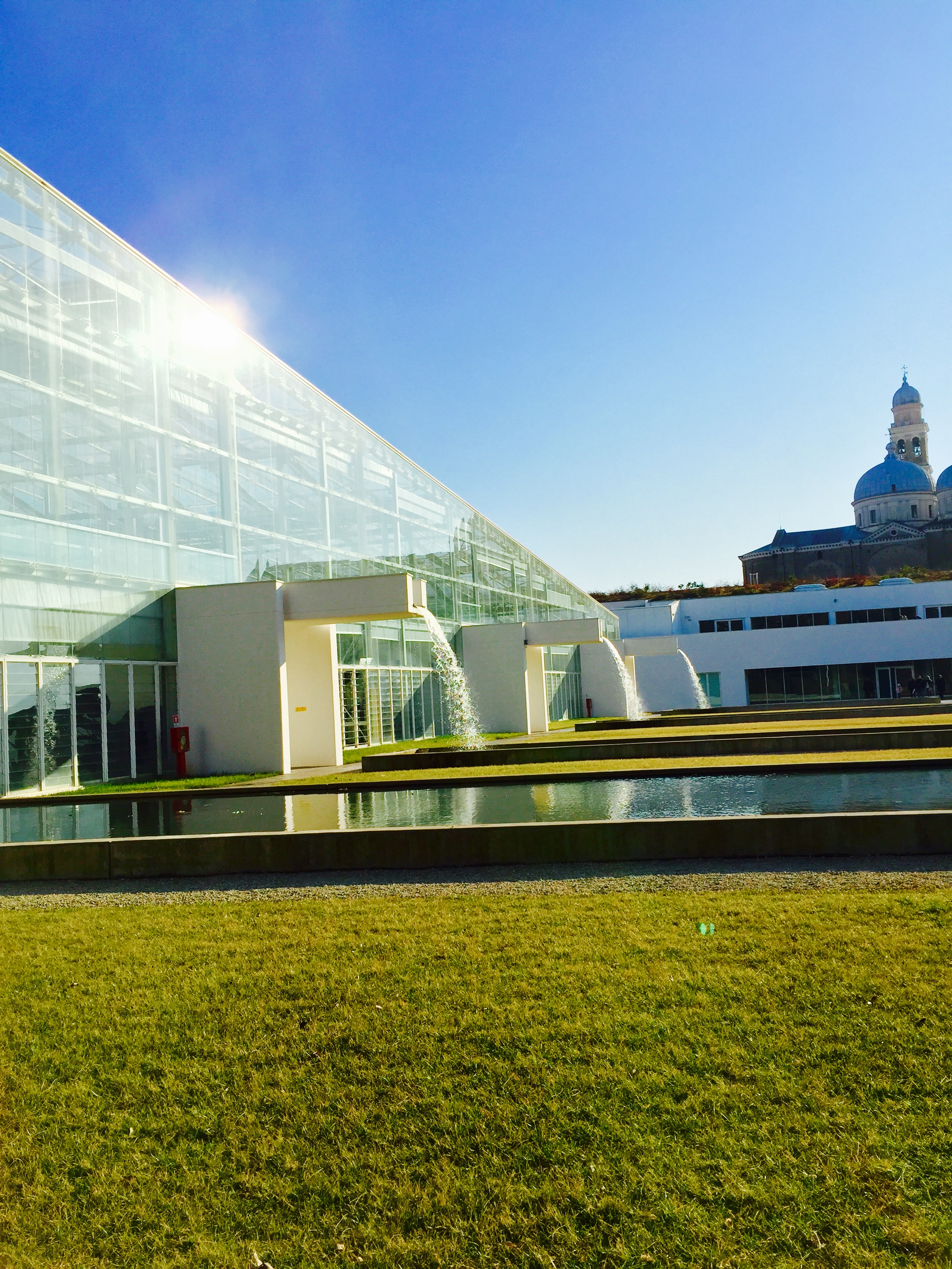 Nuova ala dell'Orto Botanico dell'Università di Padova